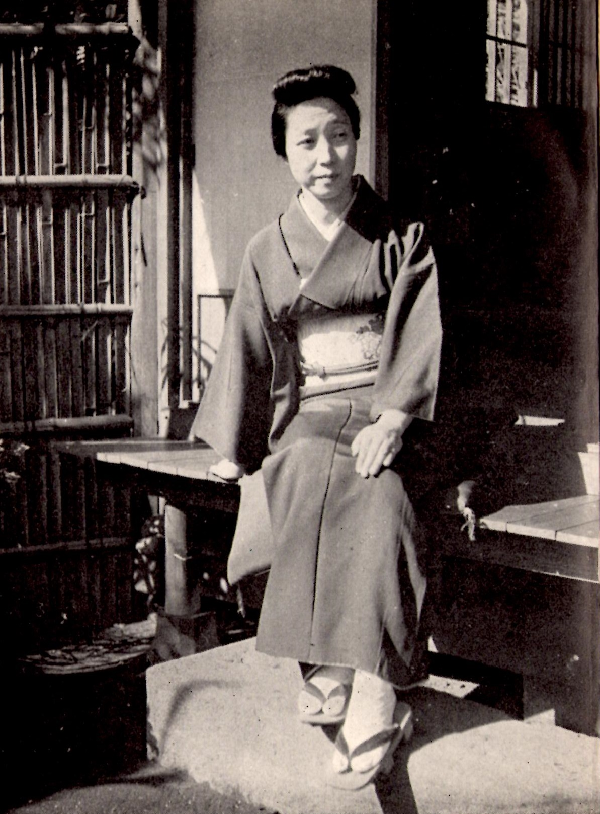 昭和26年刊行『こんなこと』（創元文庫）より。